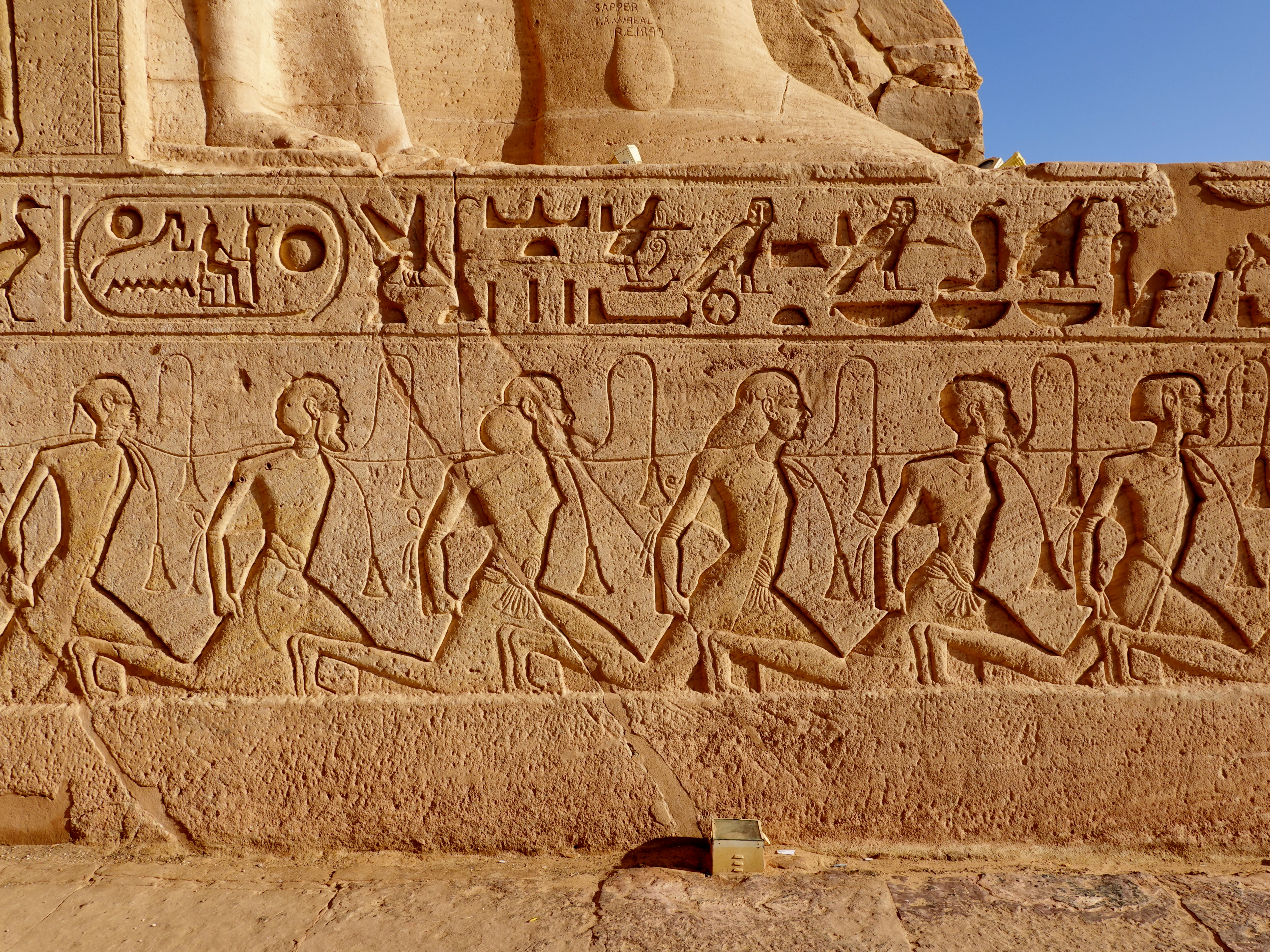 Relief asiatischer Gefangener am nördlichen Eingangsbereich des Großen Tempels von Abu Simbel, Ägypten